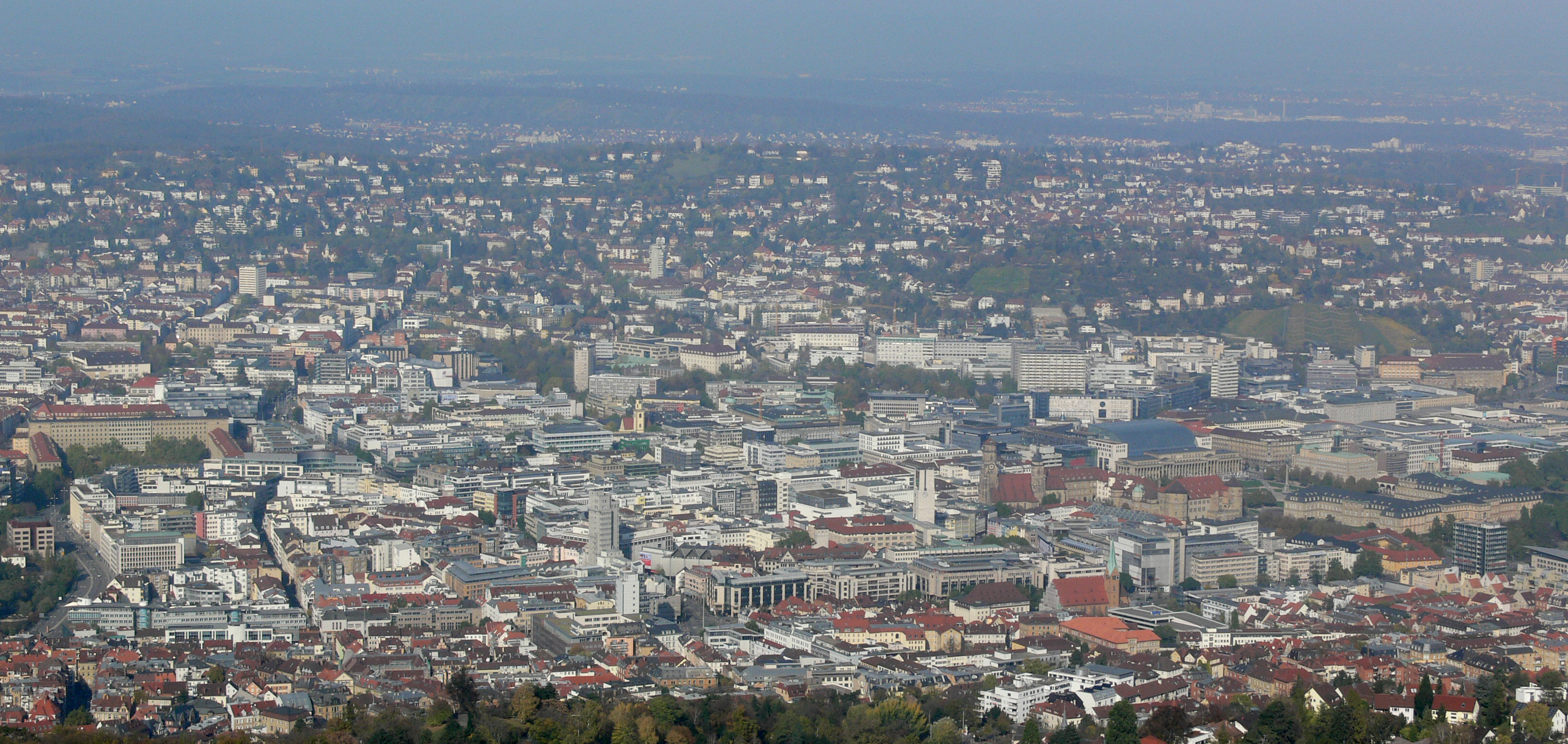 Stuttgarter Innenstadt, gesehen vom Fernsehturm